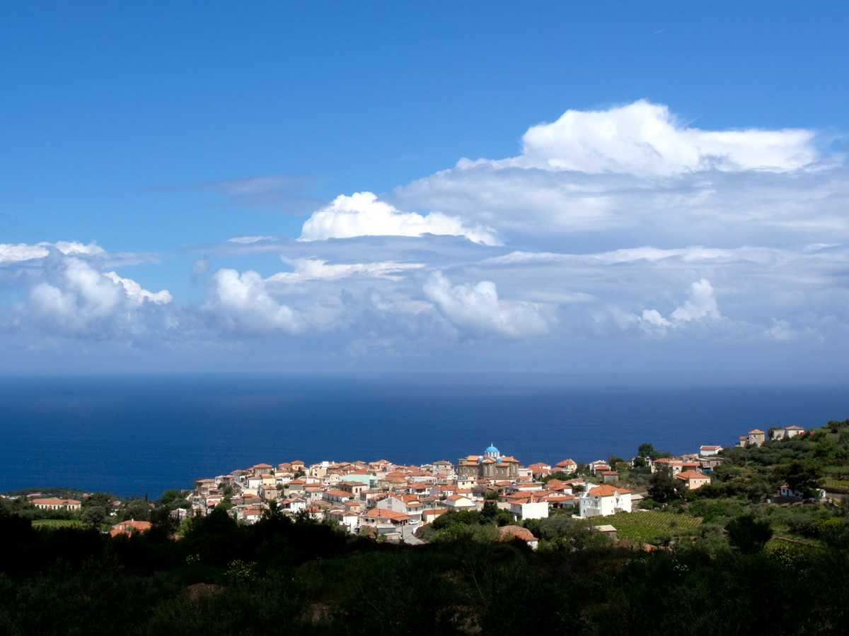 τοπιο